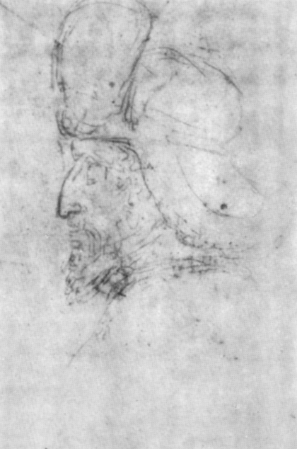 Pisanello, disegni, louvre 2479.jpg